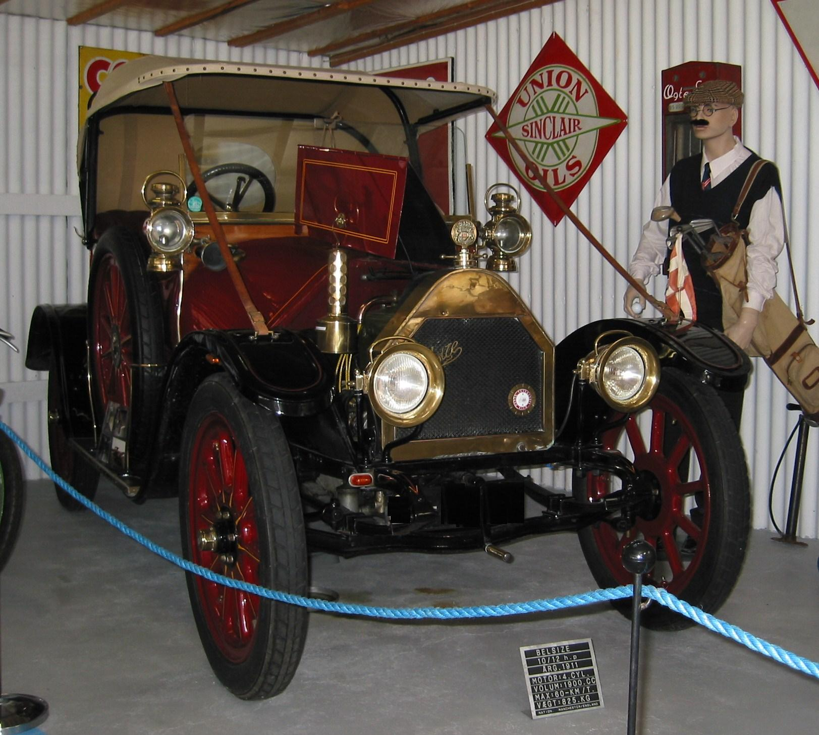 Belsize 10/12 hp Tourer (UK, 1911), Automobilmuseum in Bornholm in Aakirkeby